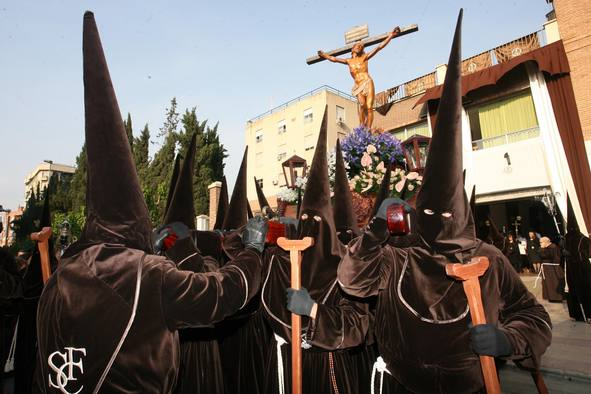 Nazarenos estantes del estilo de silencio (Murcia, España) , pertenecientes a la Cofradía de la Fe.